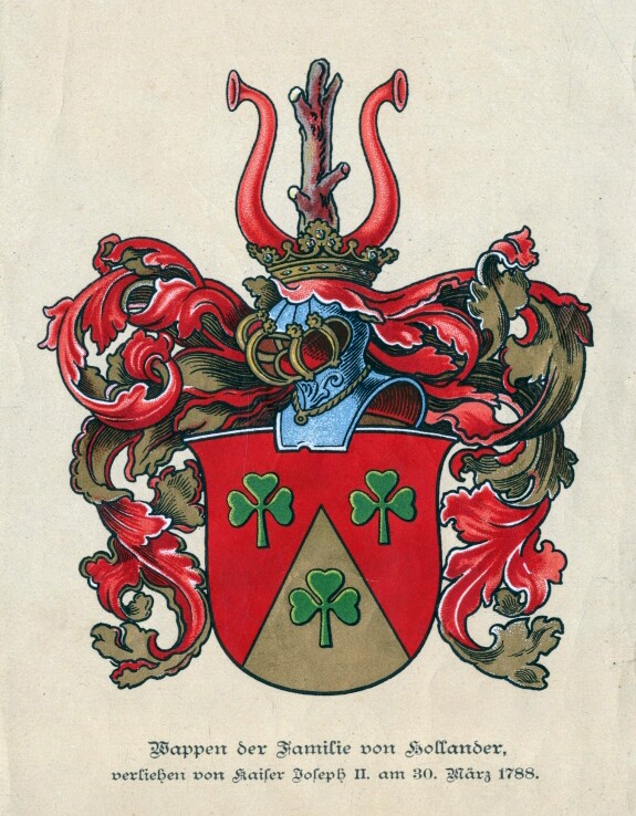 Wappen des baltischen Adelsgeschlechts von Hollander, das 1788 den ritermäßigen Adelsstand des römisch- deutschen Kaiserreiches erhielt